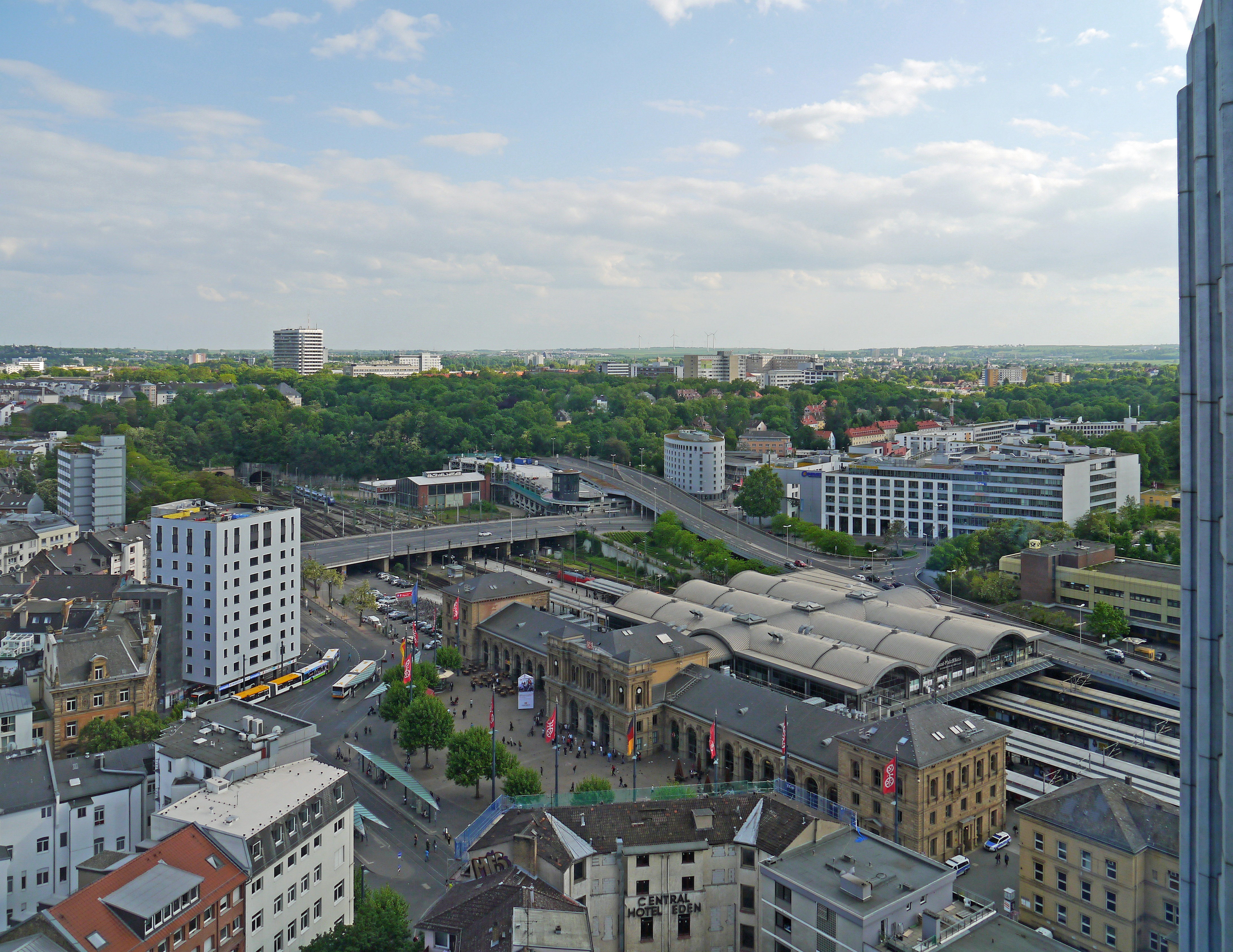 Der Hauptbahnhof in Mainz, 2015 vom Bonifaziusturm A.